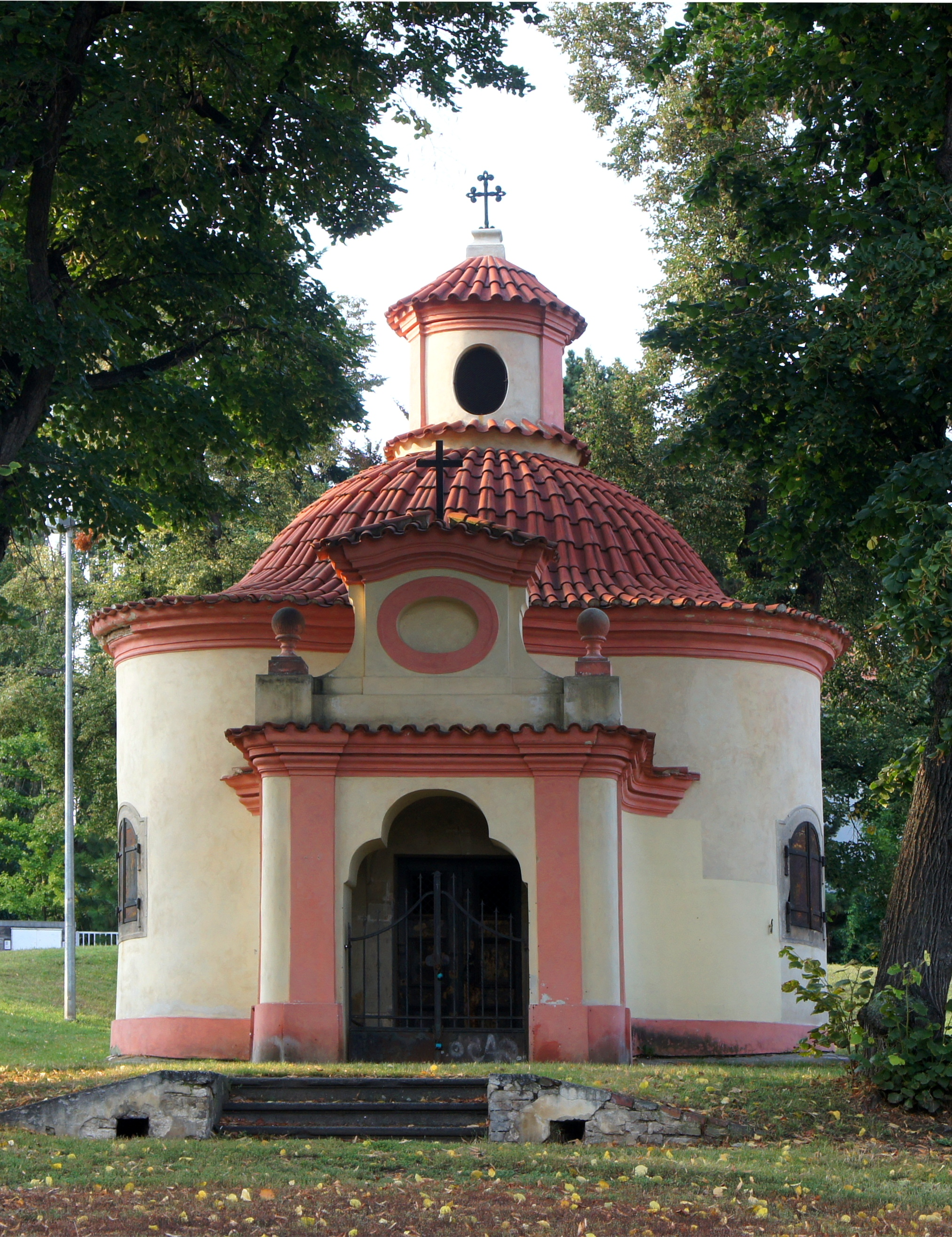 Kaple Nejsvětější Trojice (Dejvice), Praha 6, Nad Komornickou, Dejvice